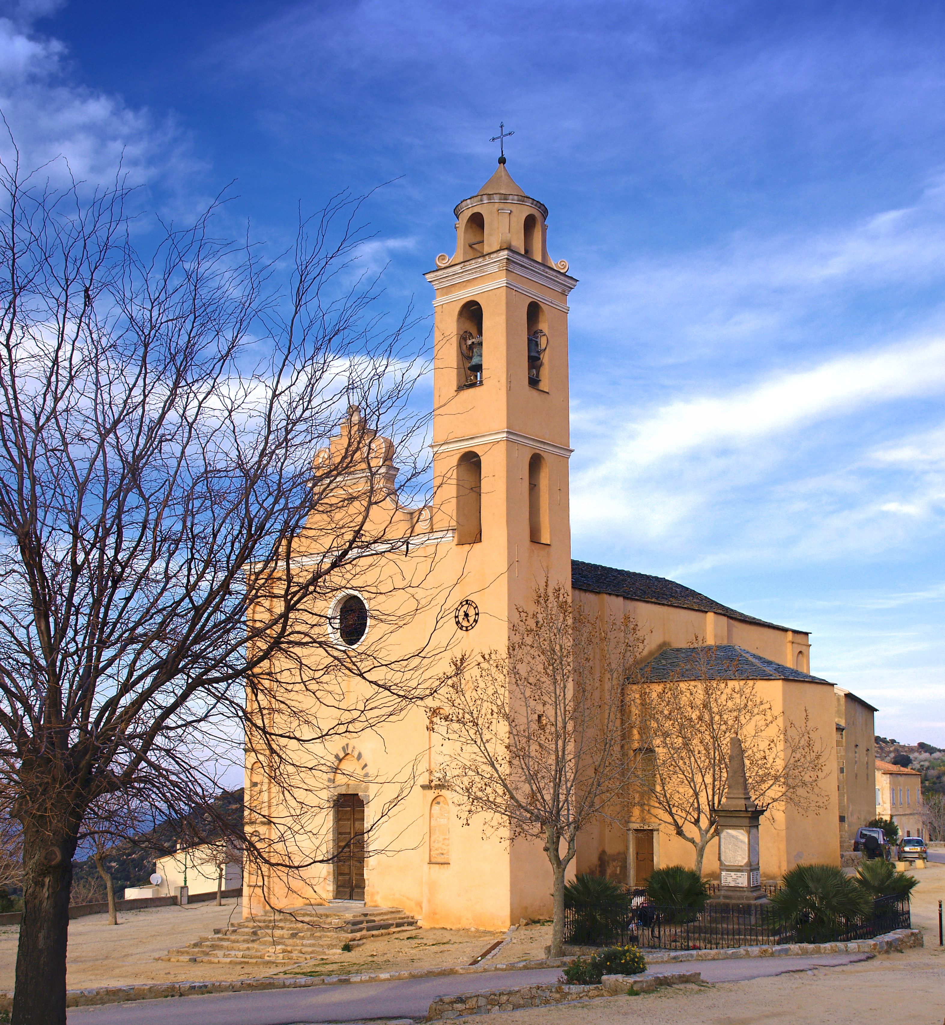 Santa-Reparata-di-Balagna (Corsica) - L'église paroissiale Sainte-Reparate